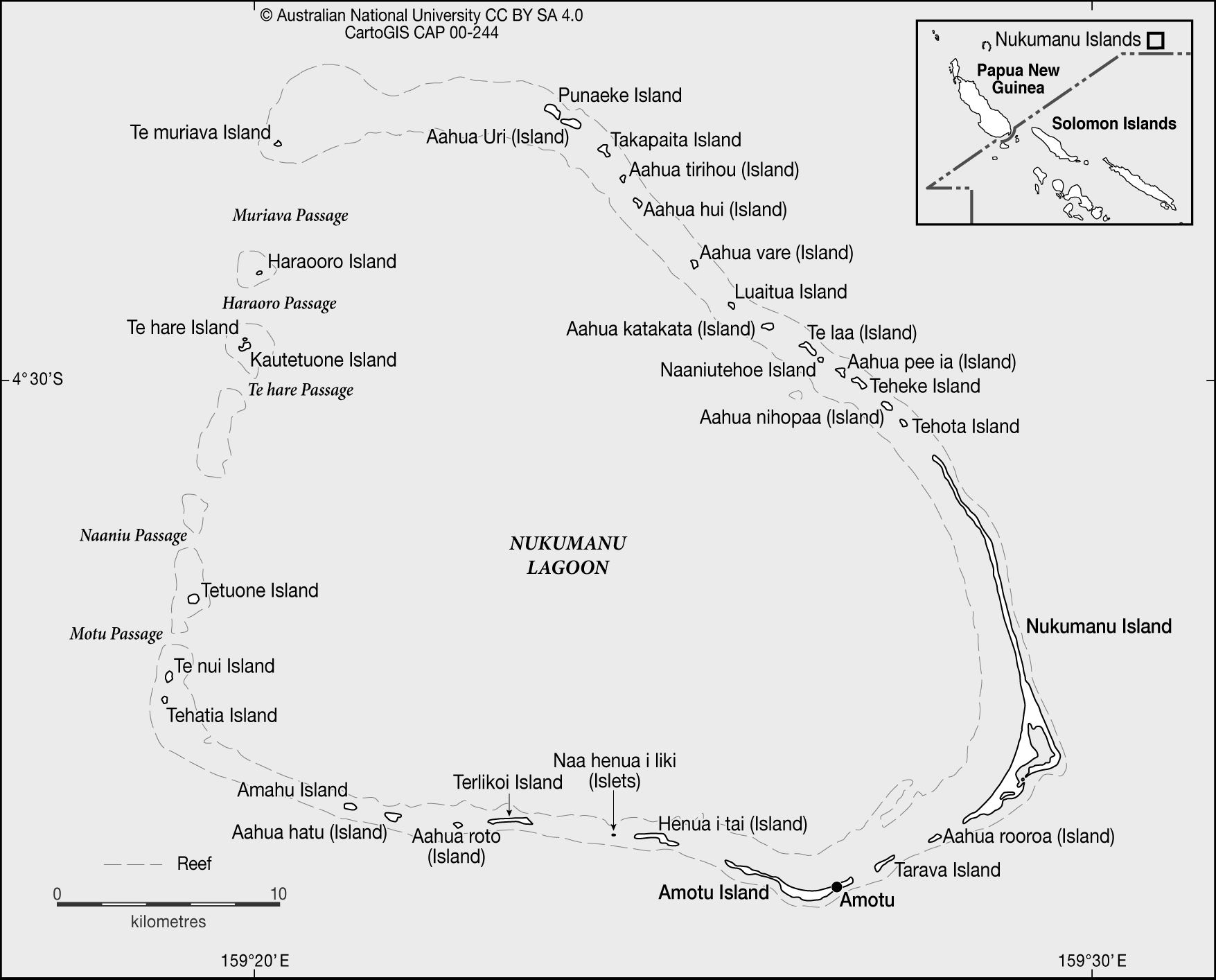 Nukumanu Islands, a remote atoll of Papua New Guinea